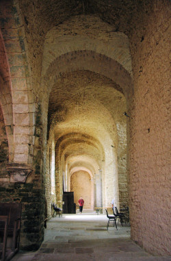 vue des voutes d'un bas coté de l'église de Gigny (Jura)